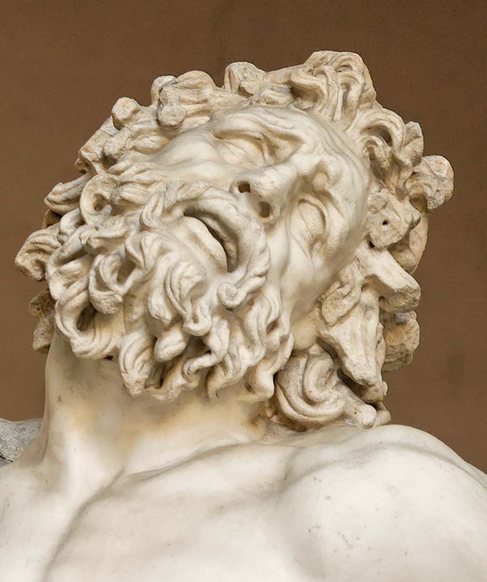 cabeza de laoconte y sus hijos